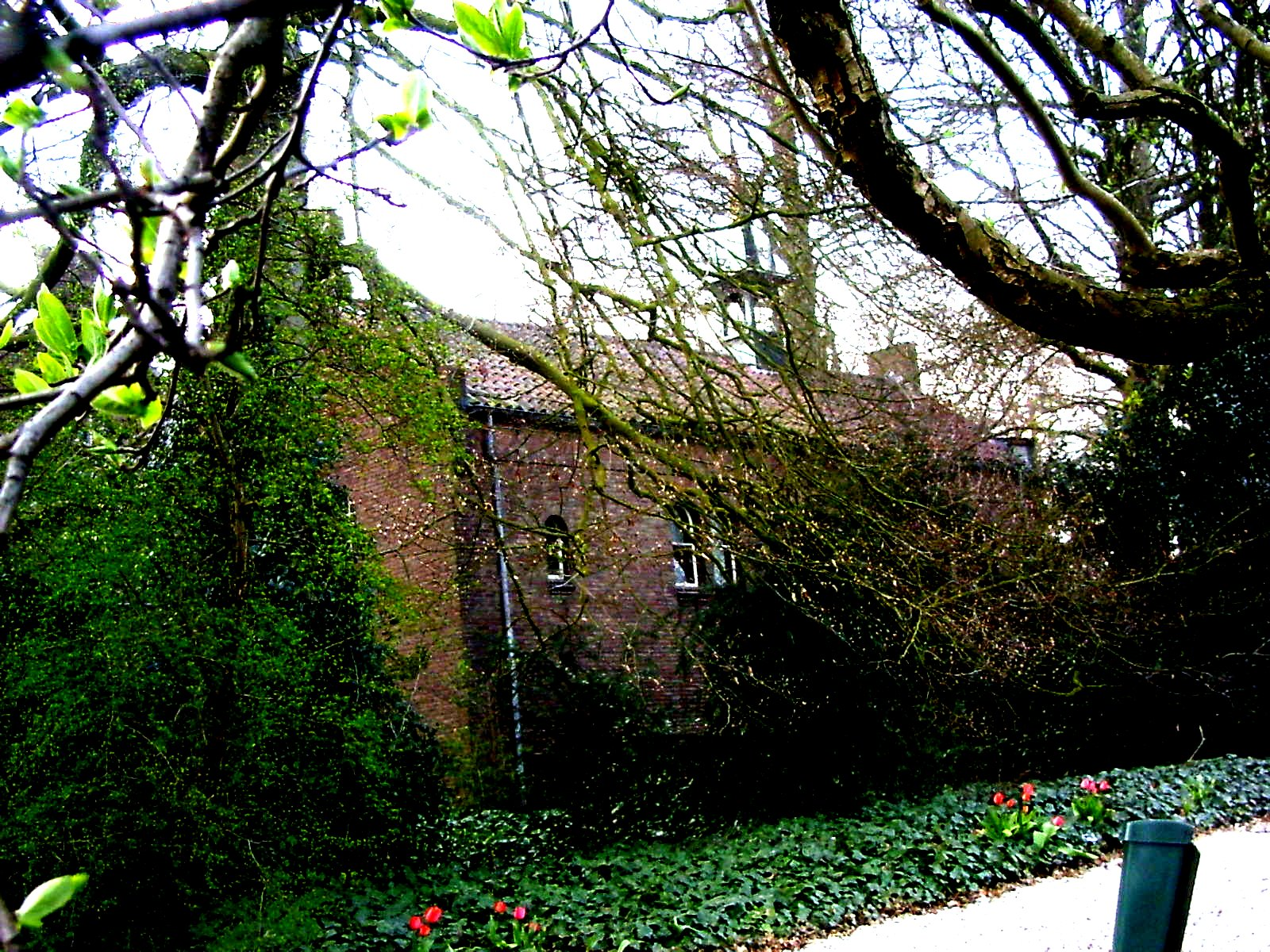 Renkum, Utrechtseweg, kloosterkapel. In deze kapel zijn de kerkopnamen gemaakt van de film knielen op een bed violen.